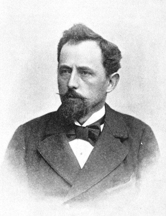 Václav Jansa (1859 - 1913), Český malíř a ilustrátor.